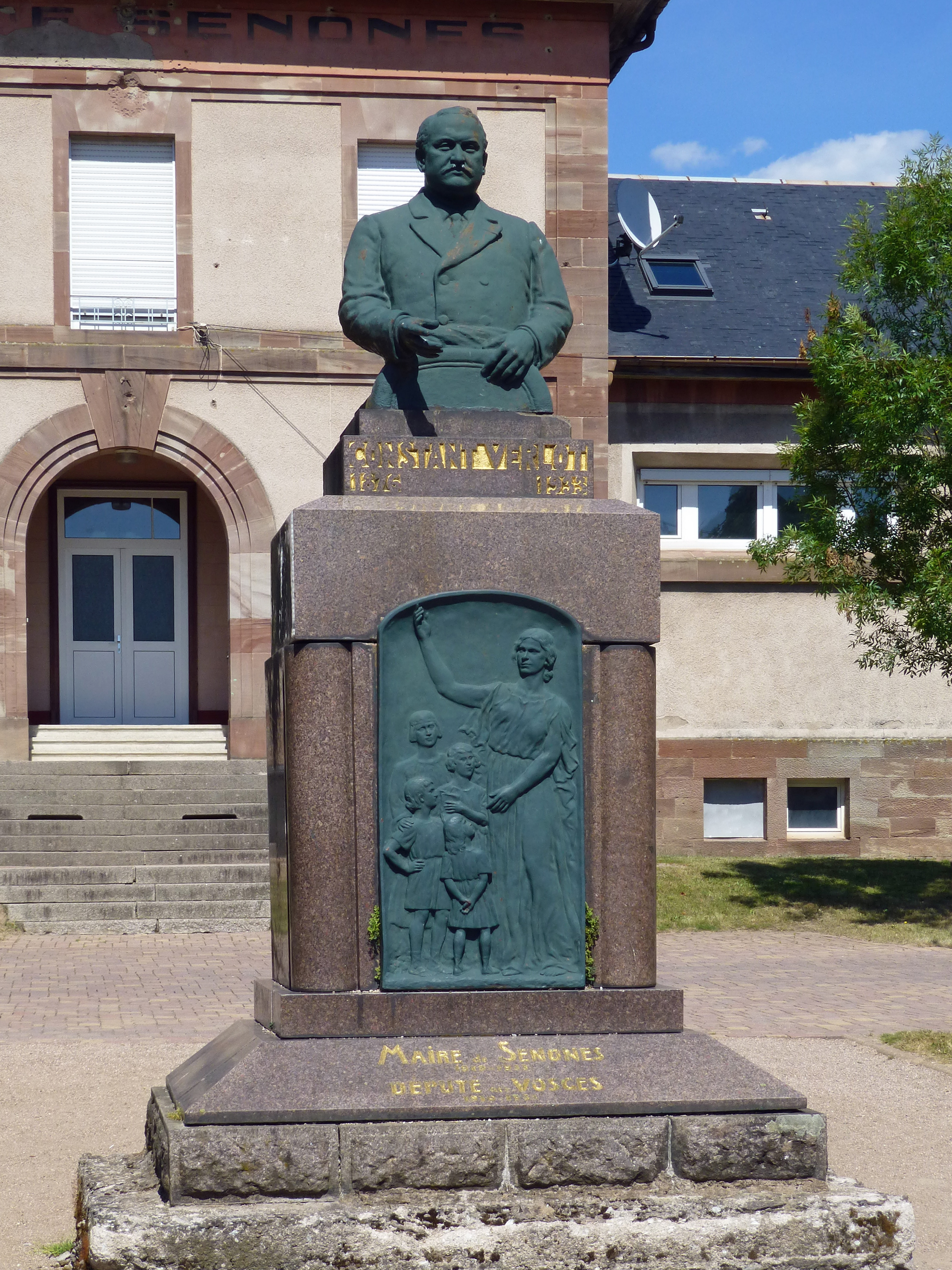 Senones (Vosges) : monument à la mémoire de Constant Verlot, député-maire